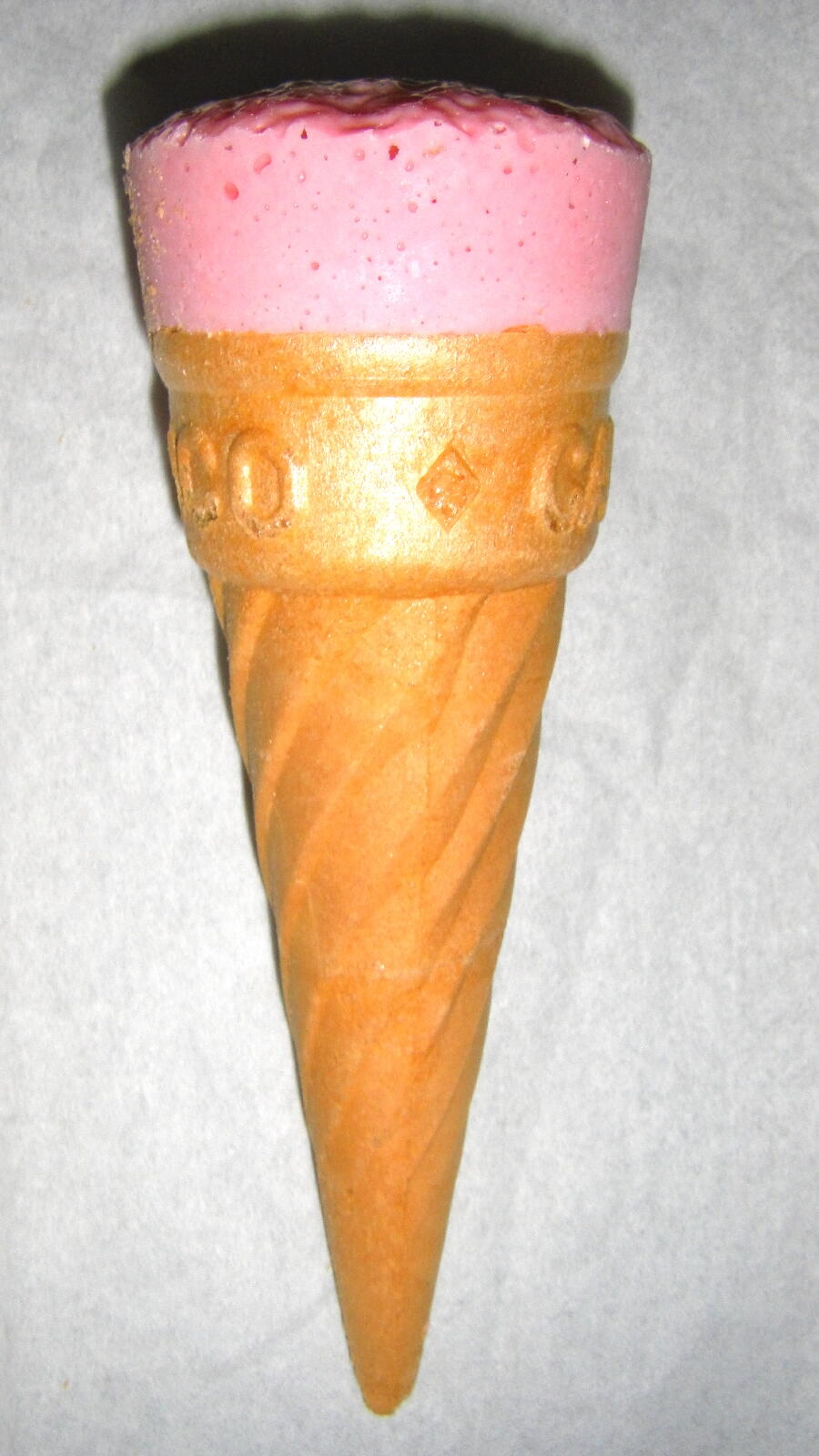 カプリコ